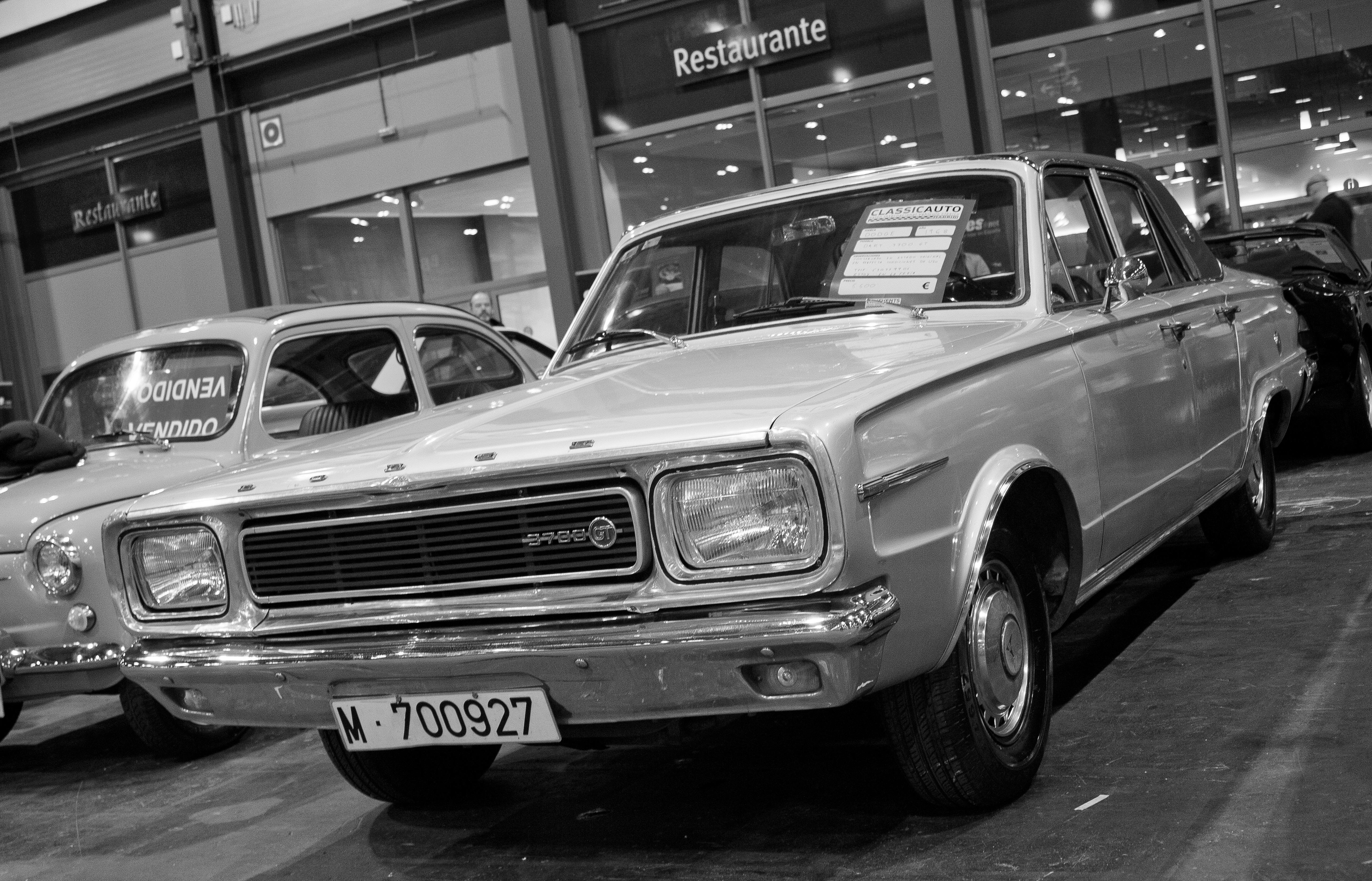 1968 Dodge Barreiros Dart 3700 GT